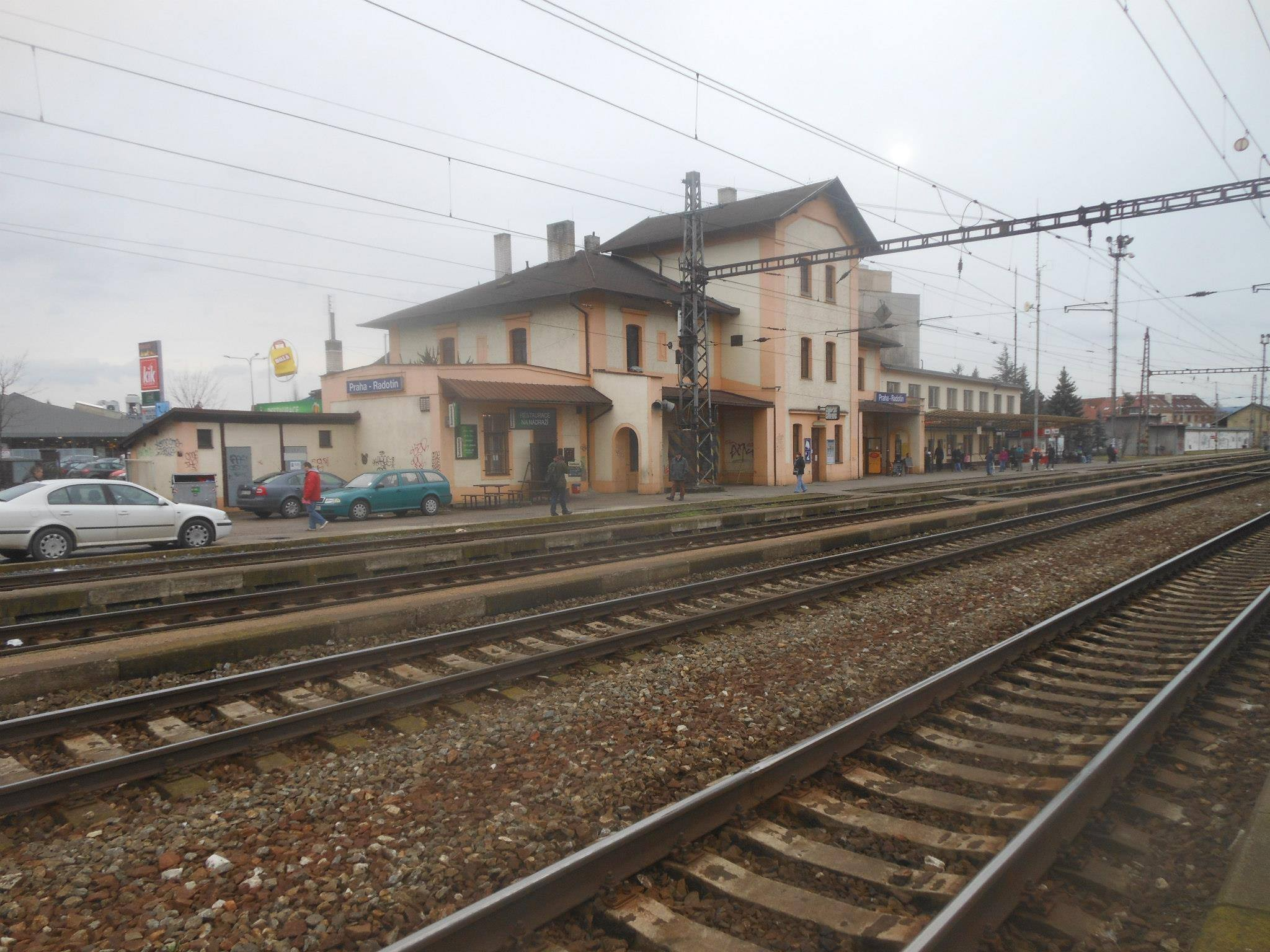 Staniční budova